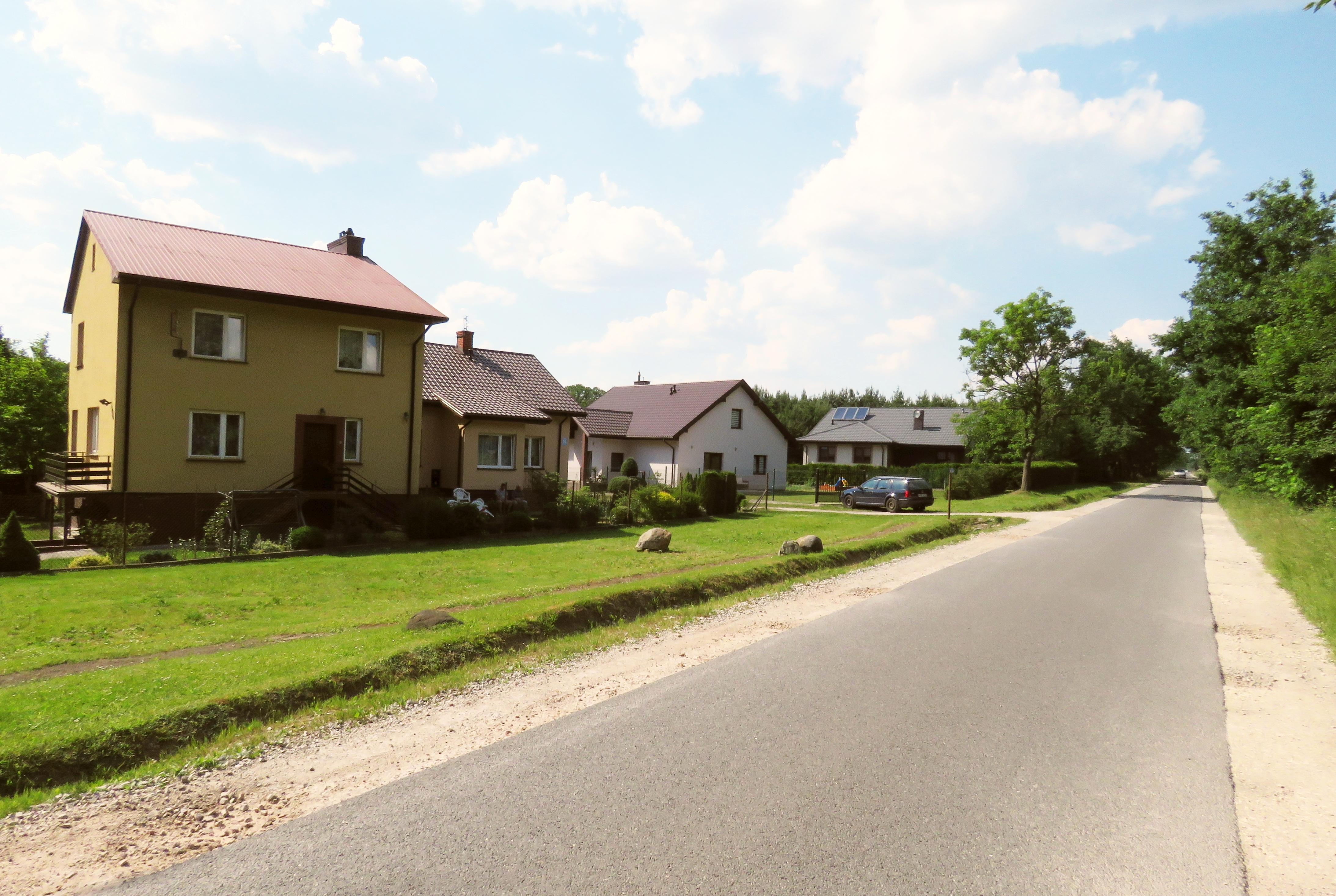 Grzmiąca, gm.Żabia Wola